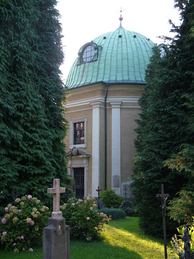 Grab Erzbischof Raitenau in Salzburg